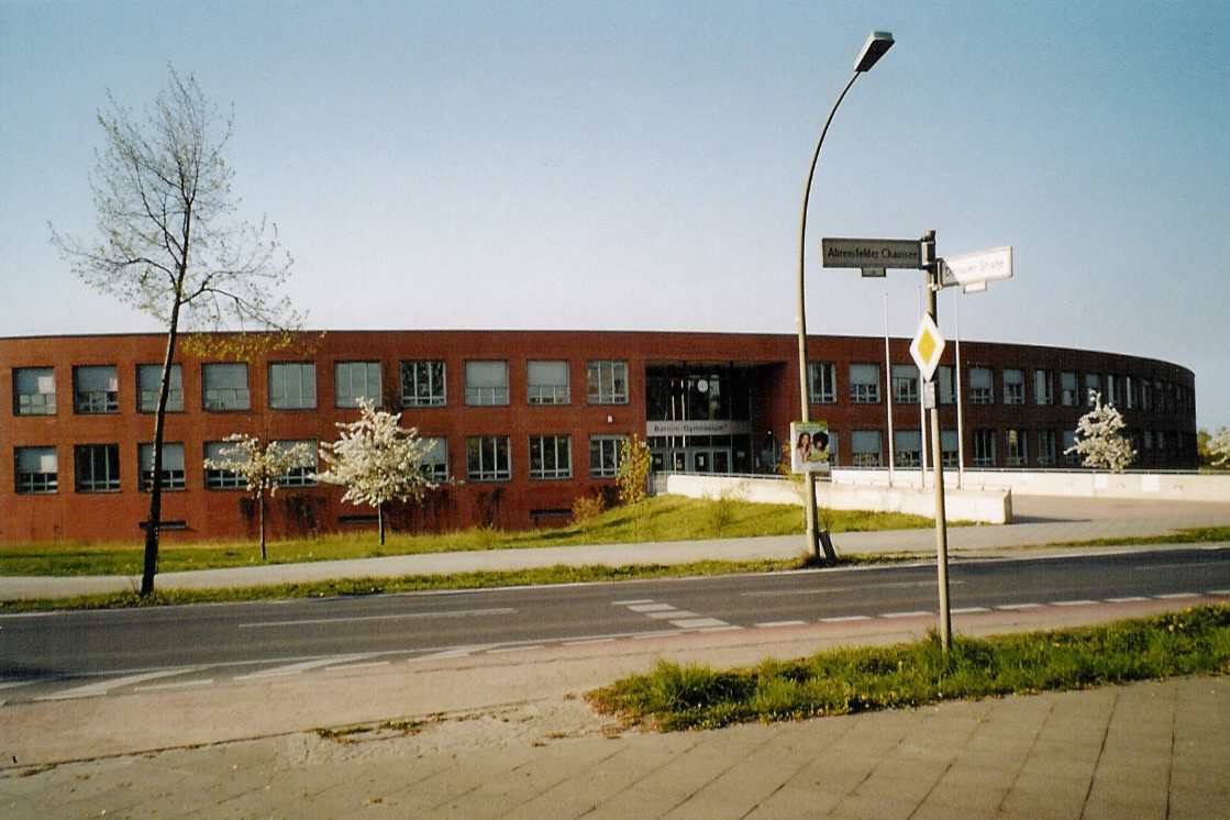 Das Barnim-Gymnasium von Berlin-Falkenberg in der Ahrensfelder Chaussee 41.